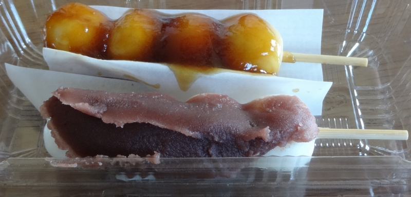 Hanazono dango